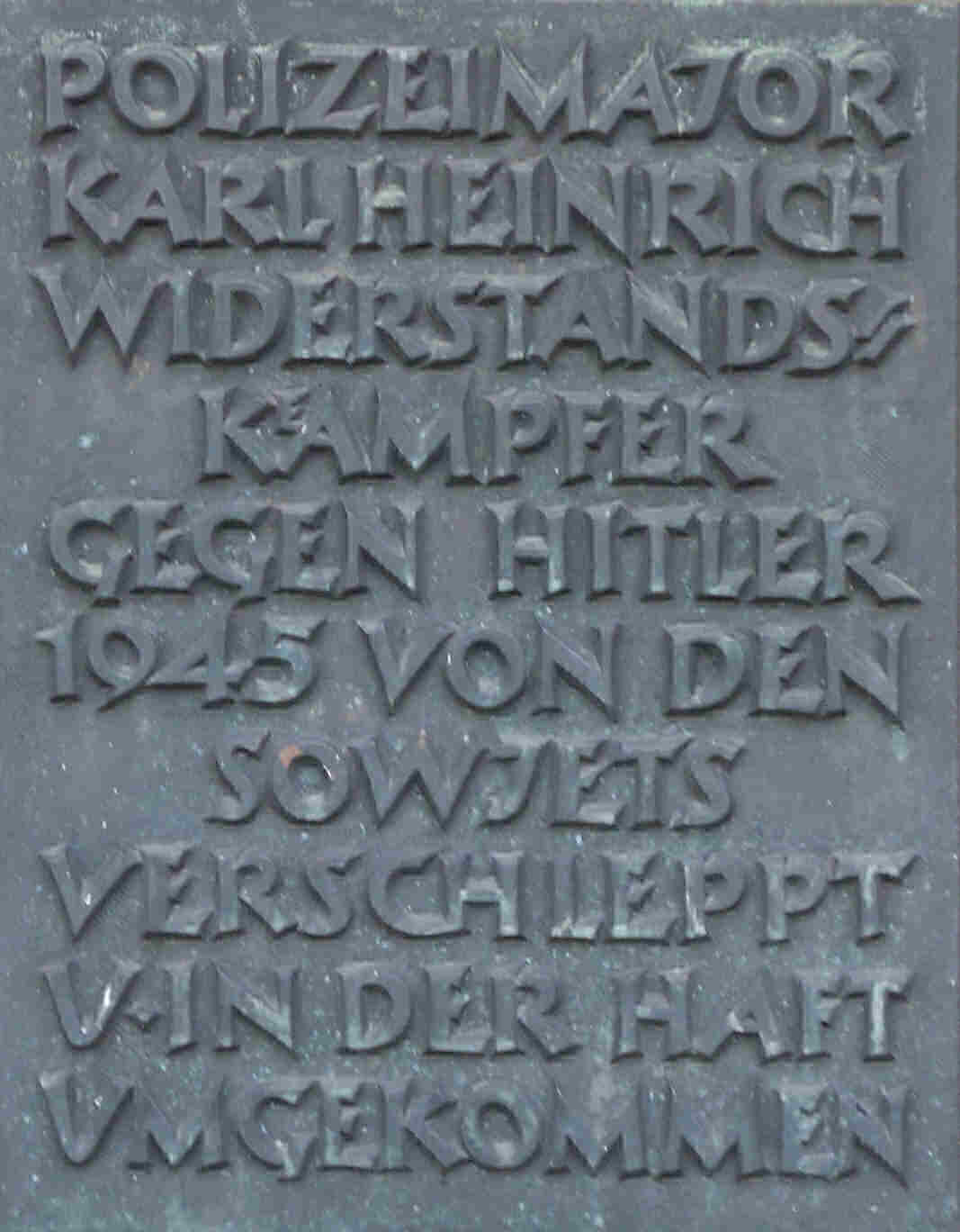 Gedenktafel Karl Heinrich Spandau, gestaltet von Paul Brandenburg